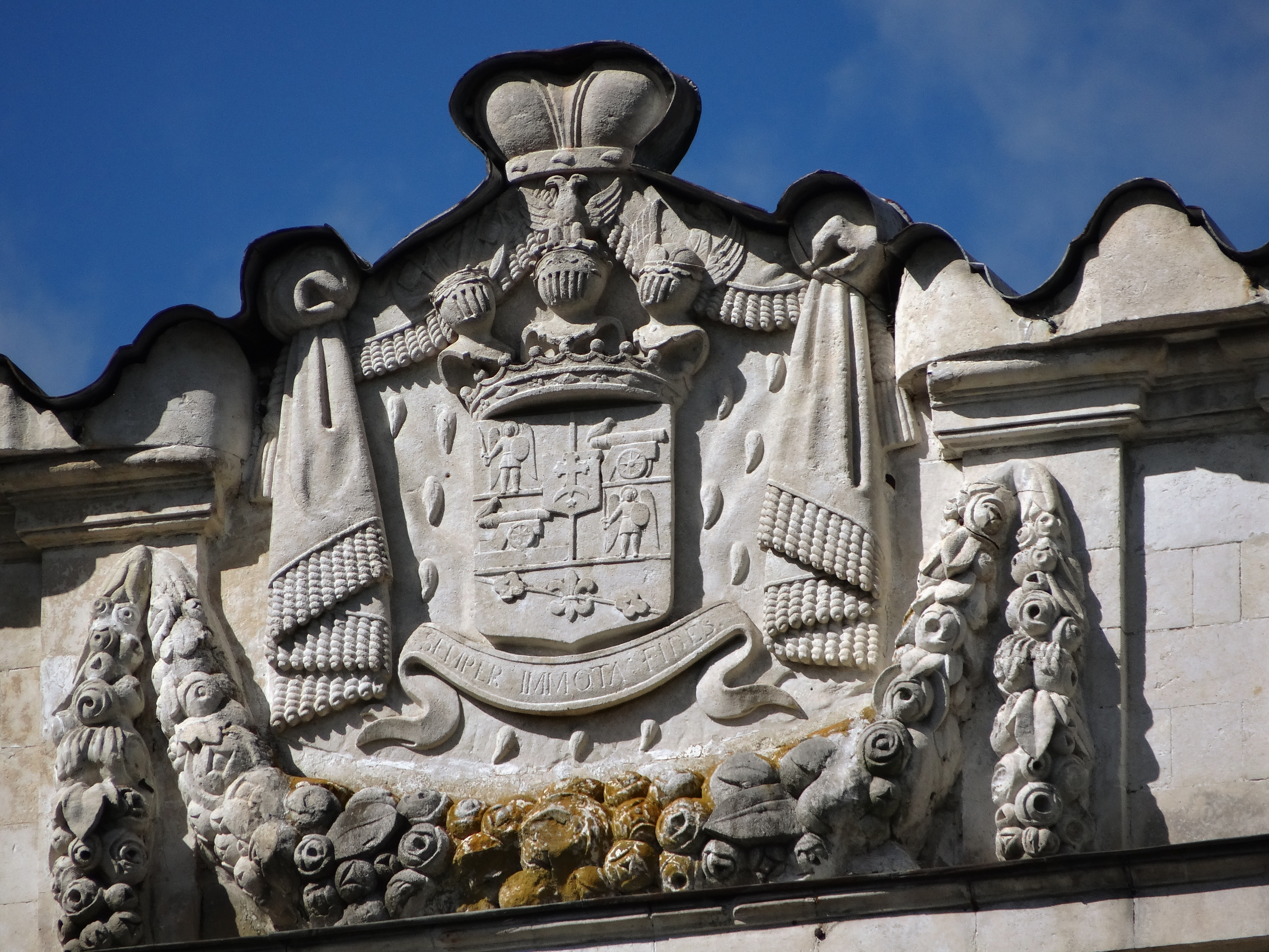 Усадьба М. М. Измайлова «Быково»: Быково (к югу от аэропорта), Раменский район, Московская область